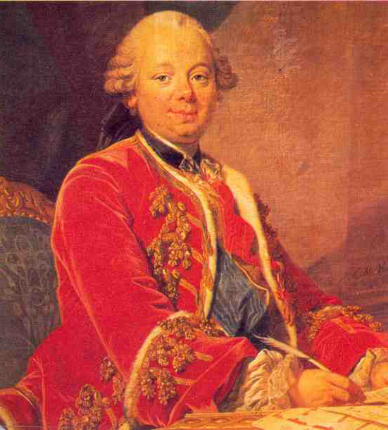 Portrait of Étienne-François de Choiseul (1719-1785)